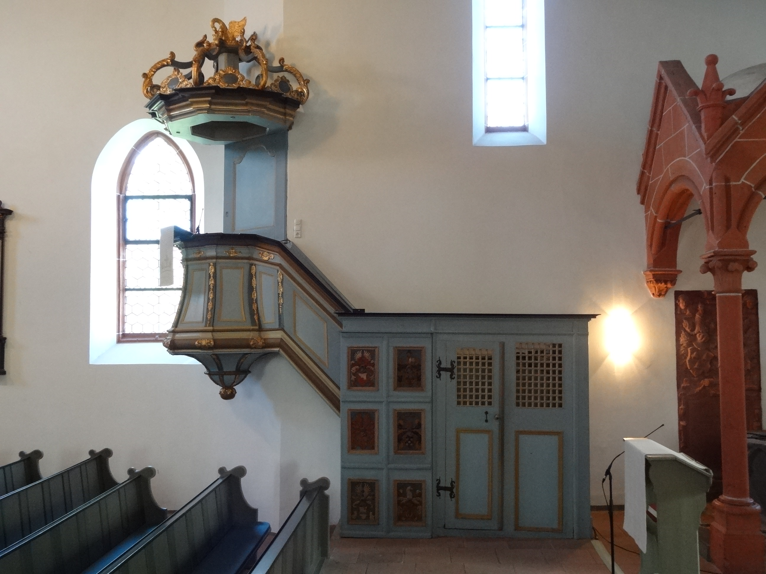 Evangelische Pfarrkirche Münzenberg